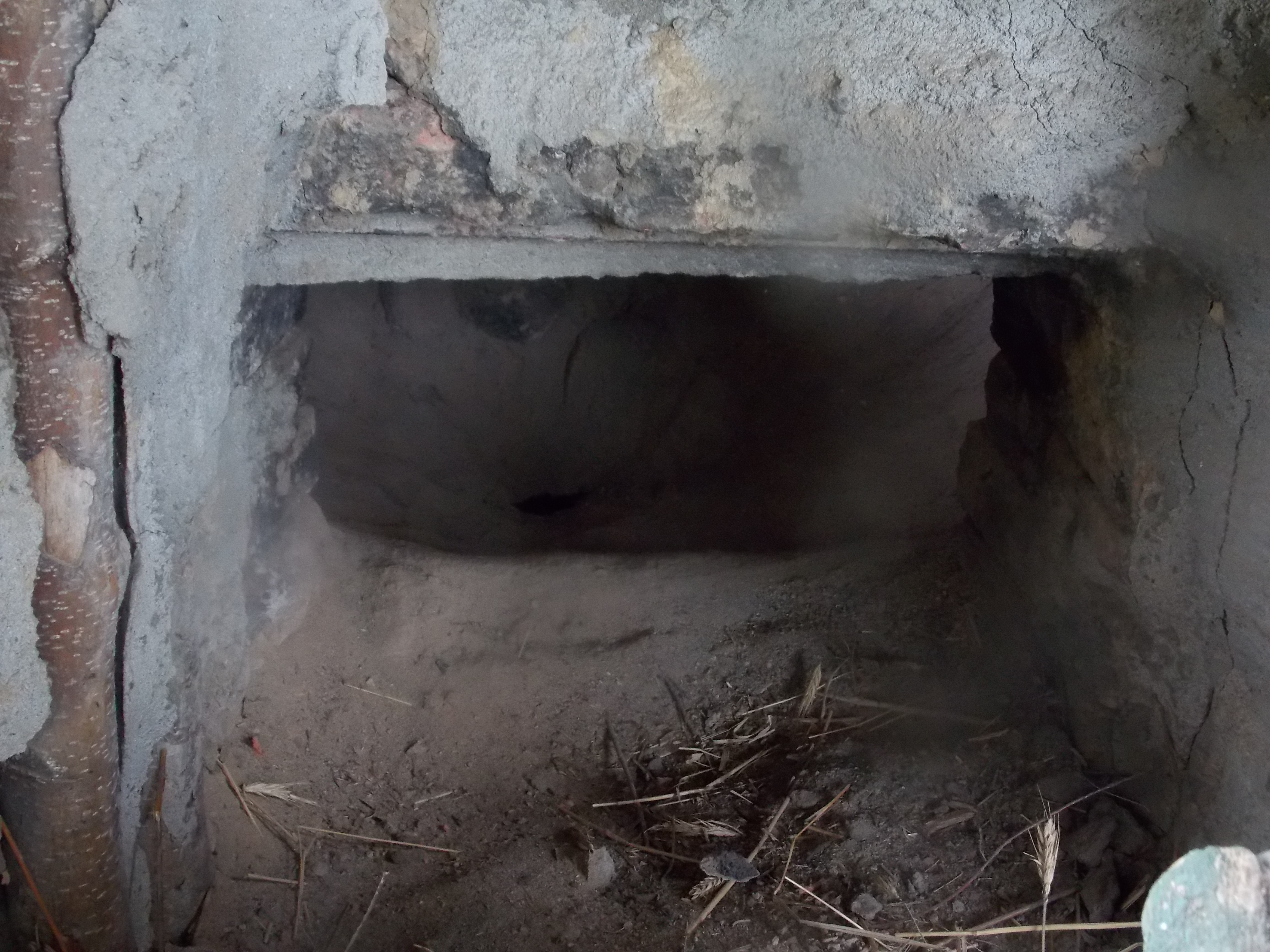 Wejście do smolarni w Sycynie.